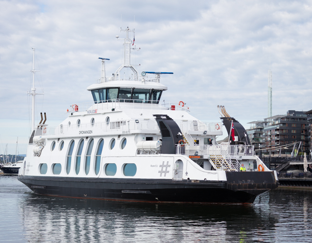 MS Dronningen på vei inn mot Aker Brygge i rute fra Nesodden.